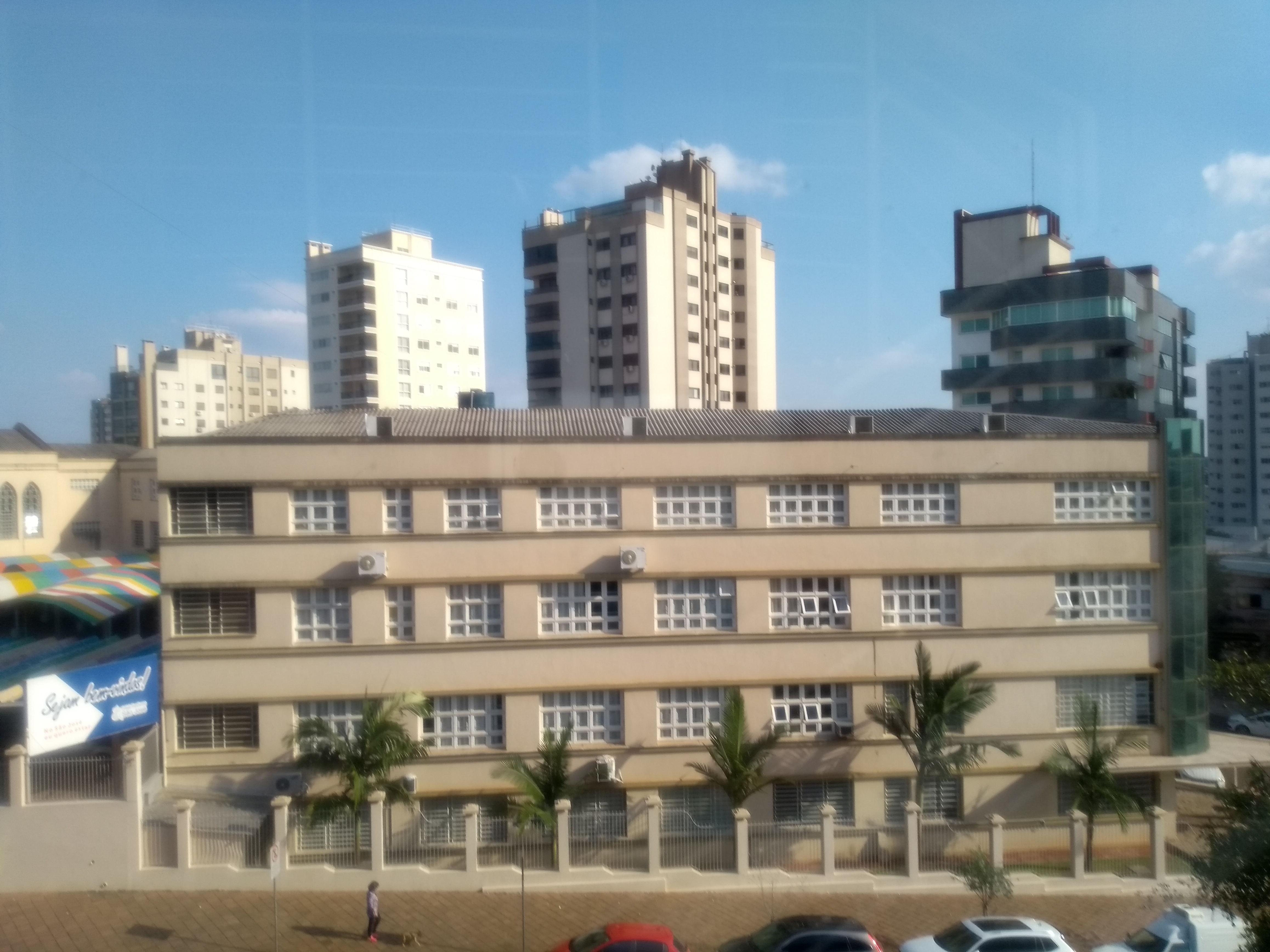 Fachada do Colégio São José, localizado em Erechim, Brasil